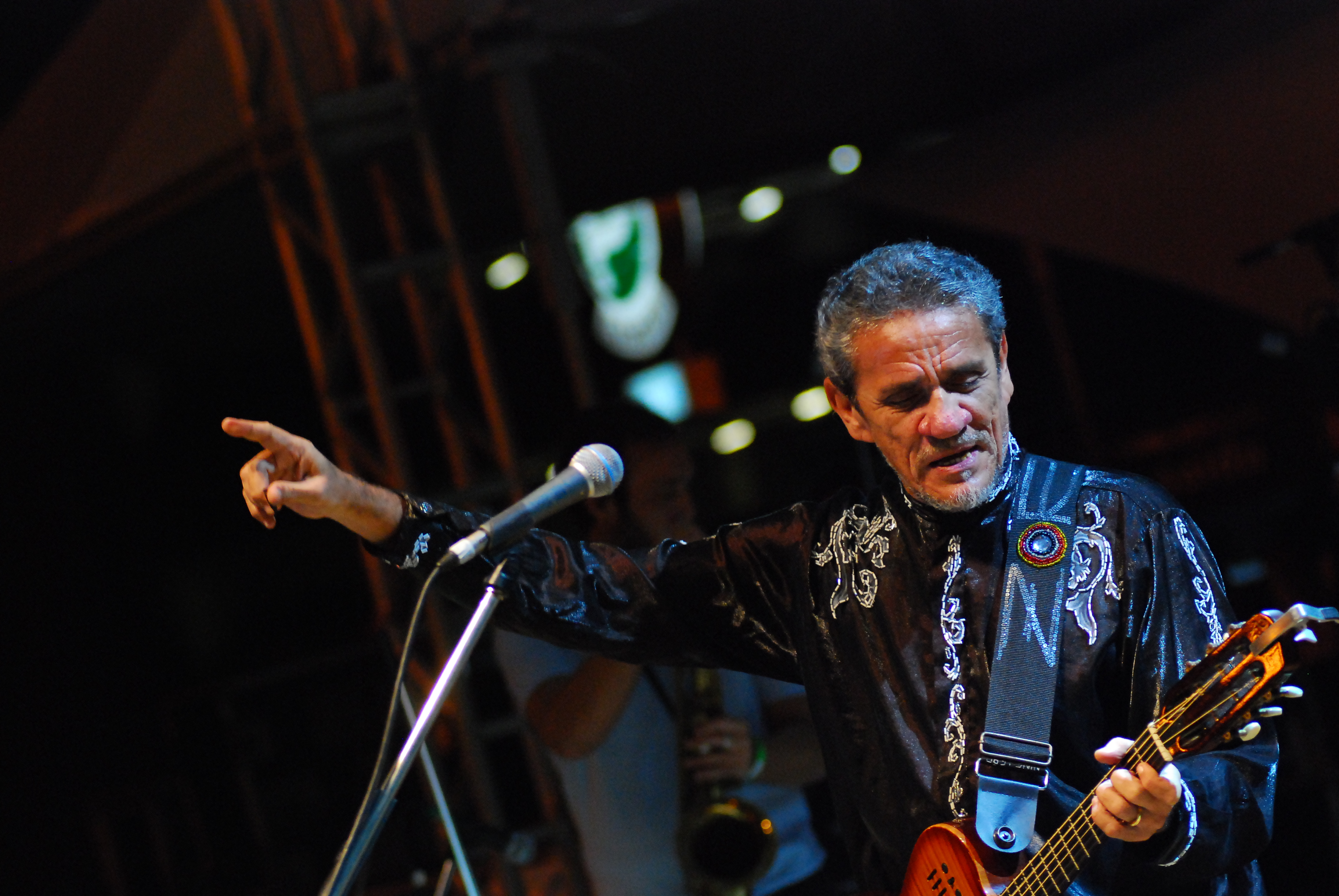 Foto: Silvio Tanaka